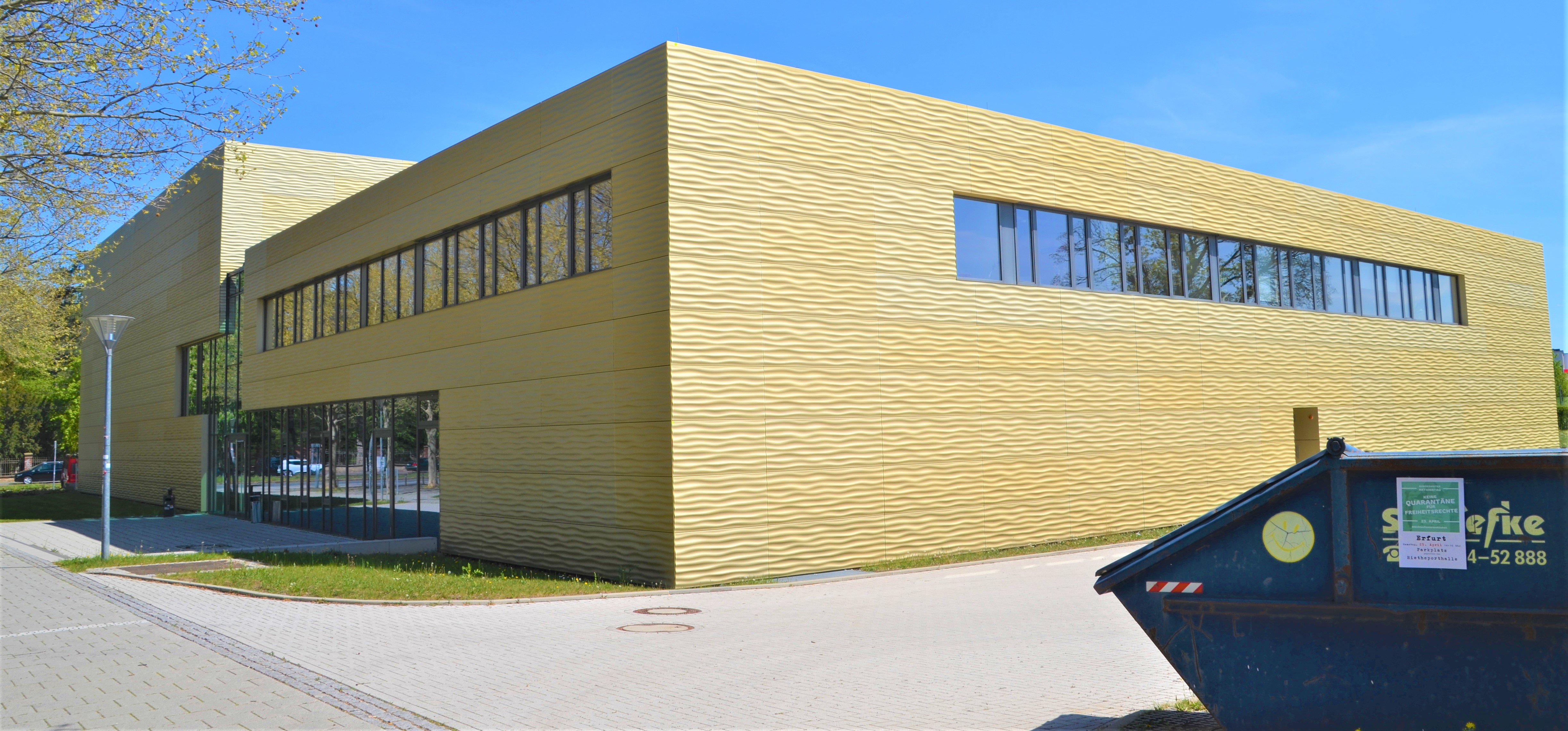 Kommunikations- und Informationszentrum der Universität Erfurt von West